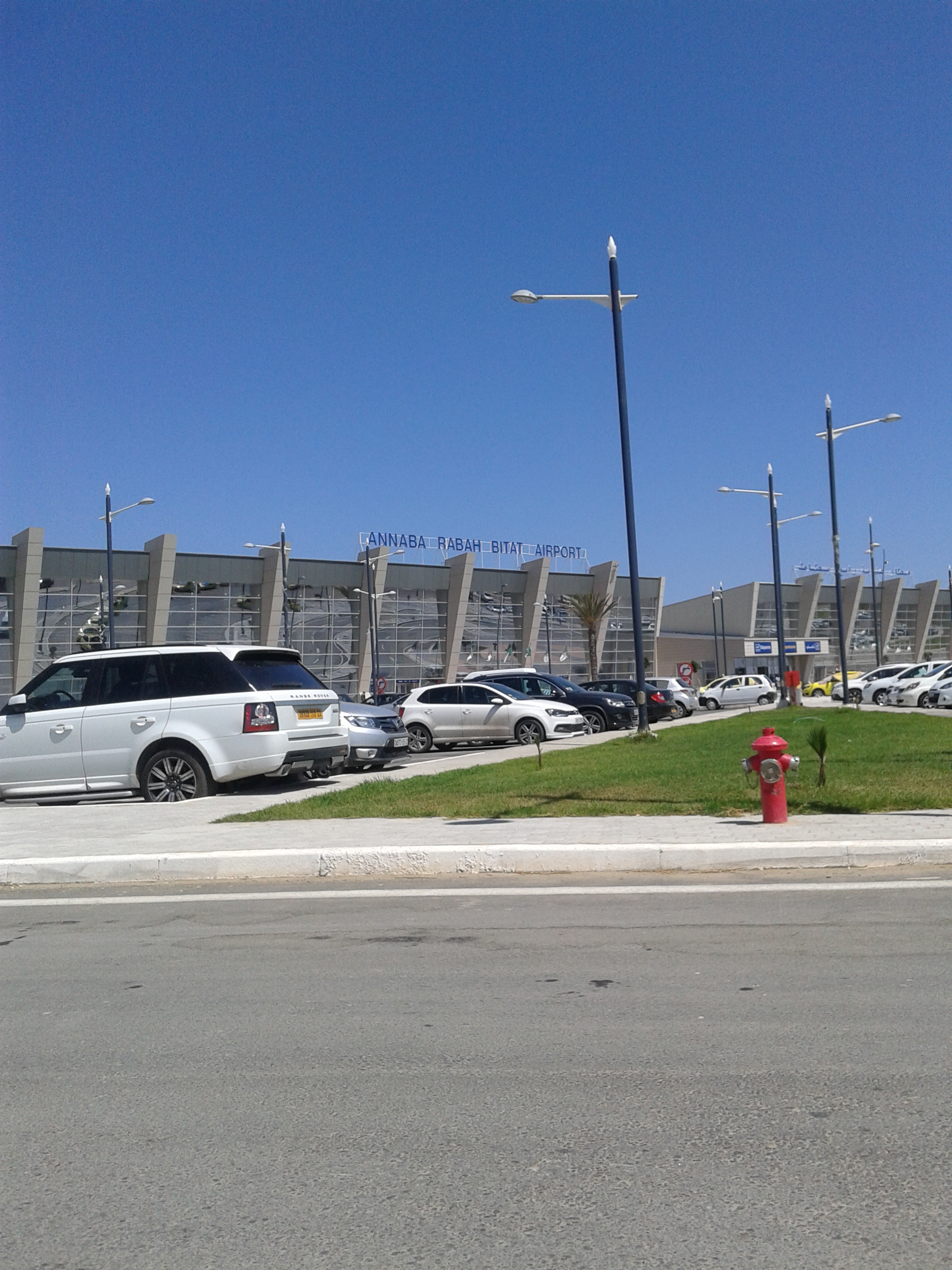 Aeroport d'Annaba - Rabah Bitat